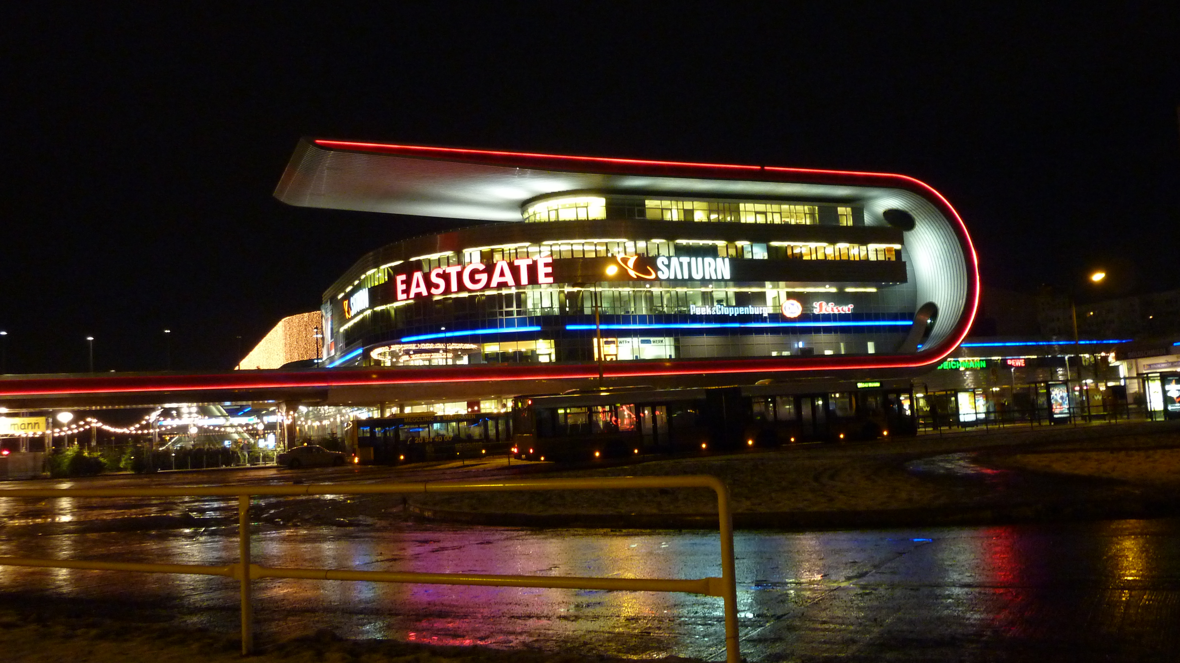 Eastgate Berlin, Ansicht von Südwesten